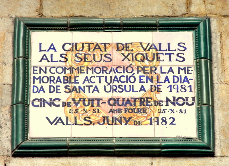 Ceràmica dedicada al Xiquets de Valls, situada a la plaça del Blat, en commemoració de la diada de Santa Úrsula del 25 d'octubre 1981. 5de8 i 4de9f. Valls, juny de 1982